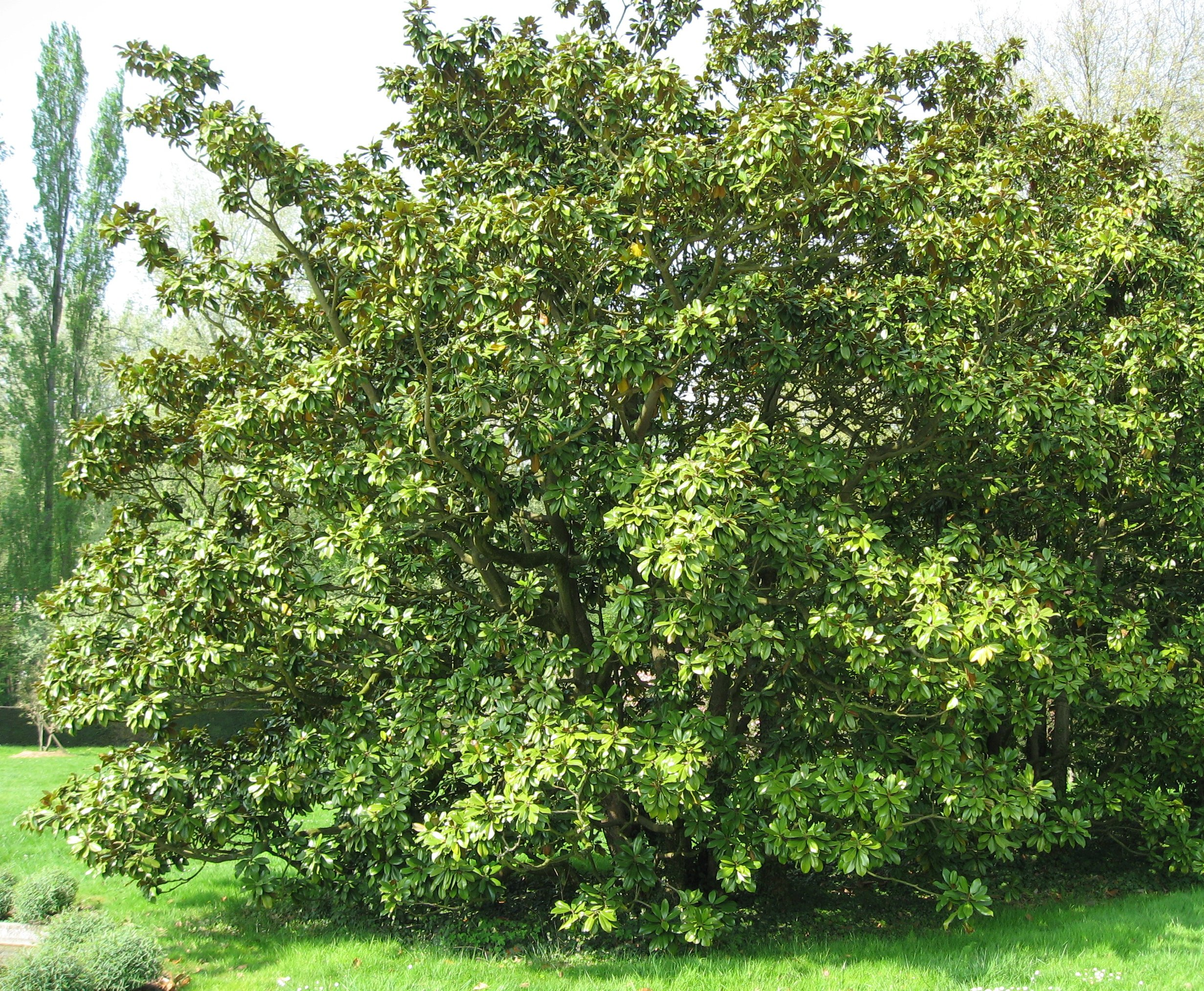 Magnolia grandiflora in Arboretum de la Vallée-aux-Loups Map: 48° 46' 22" N 2° 16' 5" E